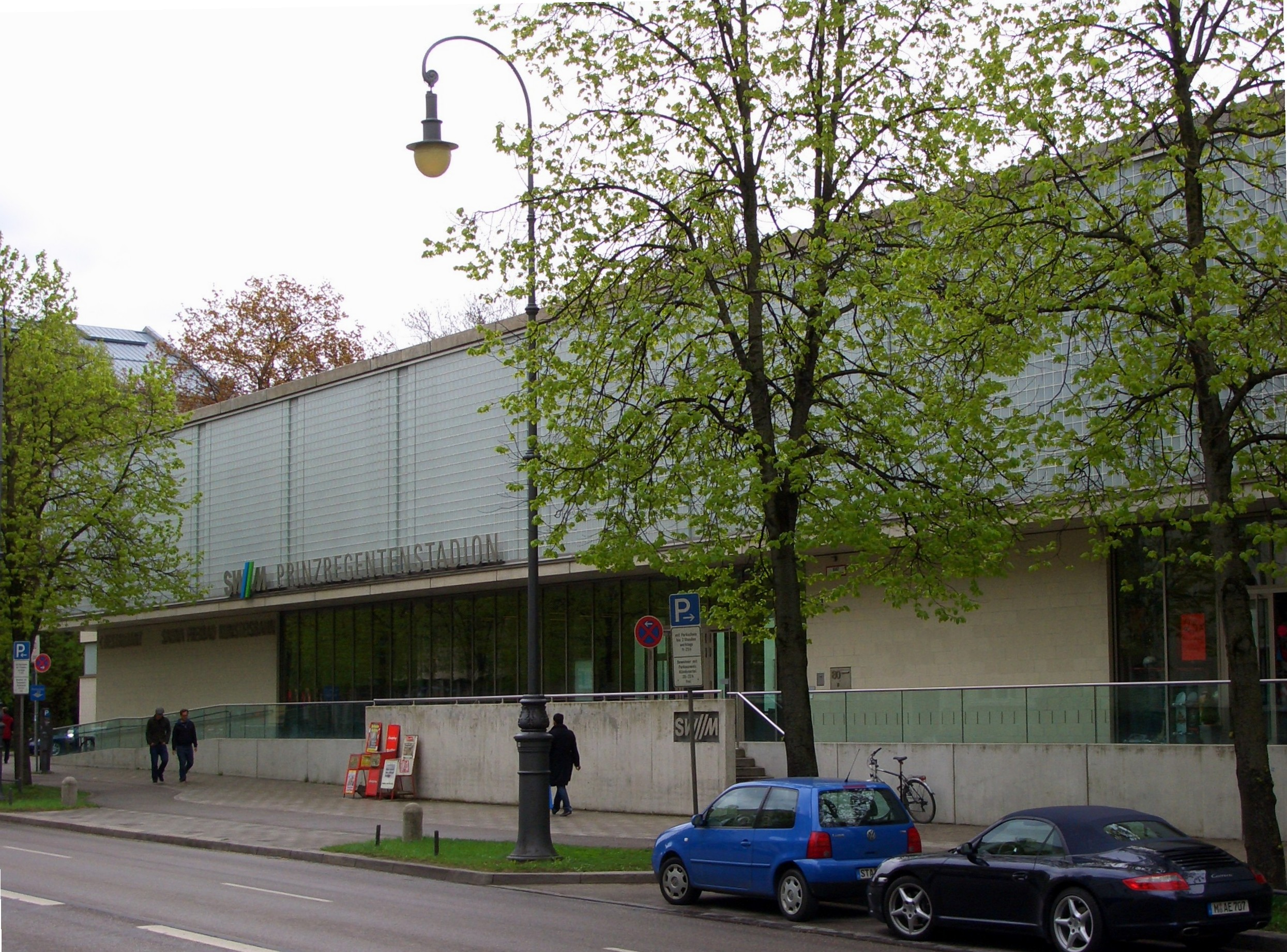 Prinzregentenstadion Muenchen Eingangsgebaeude an der Prinzregentenstrasse